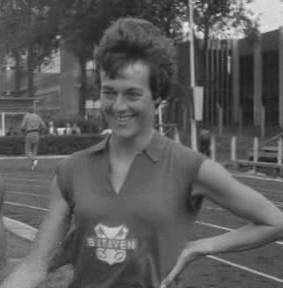 Nederlandse kampioenschappen atletiek te Rotterdam. Gerda Kraan wint de 800m hardlopen voor dames van Jannie van Eyck.